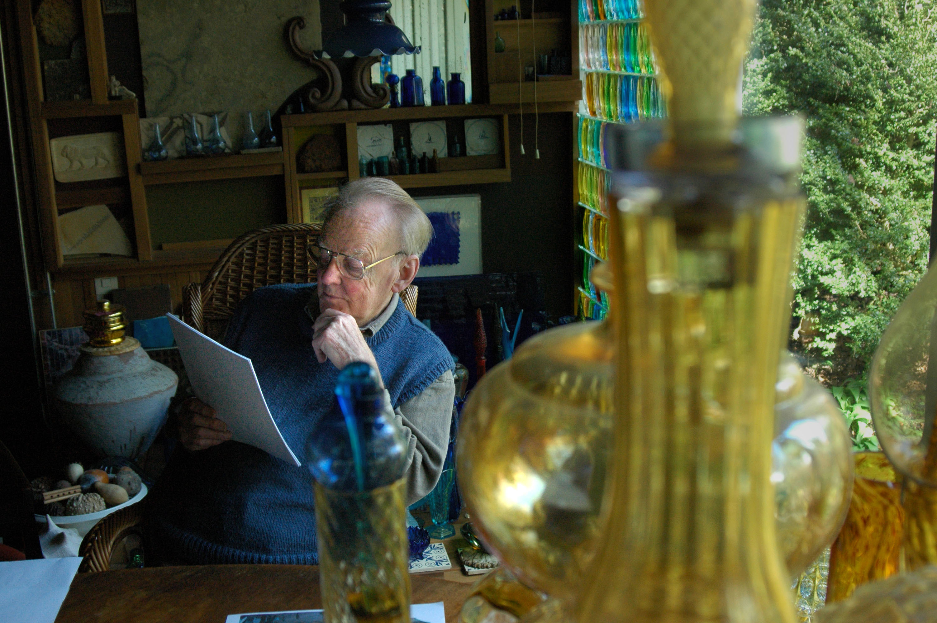 Portret van Louis le Roy, bedenker van de ecokathedraal in Mildam